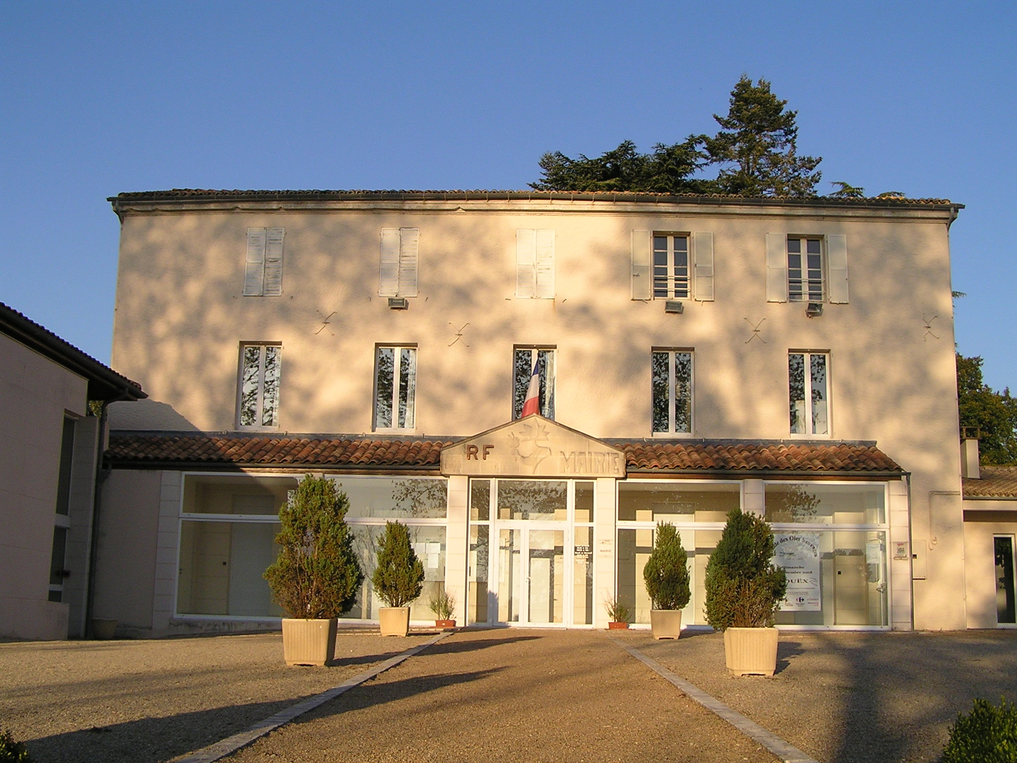 mairie de Bouëx